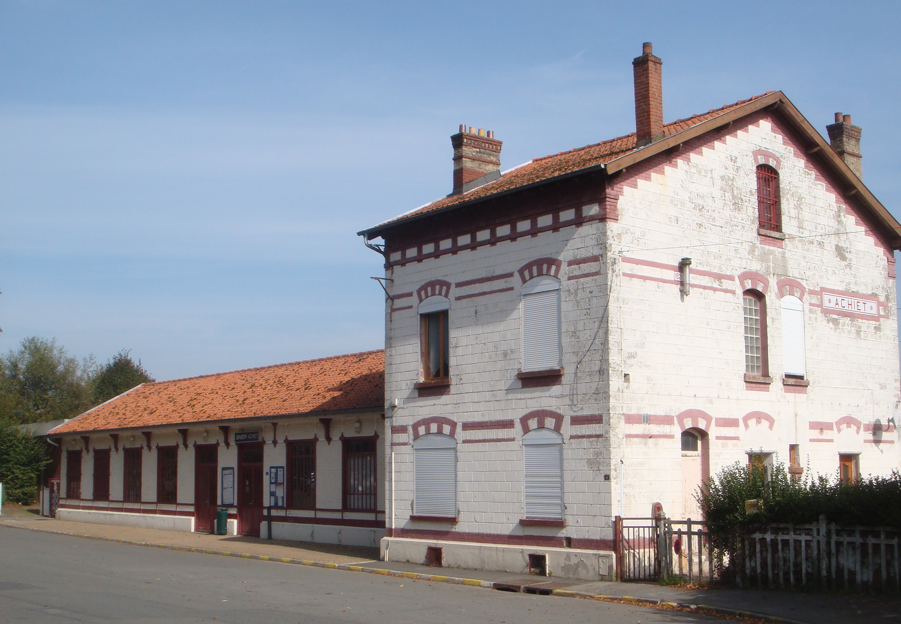 Gare d'Achiet, Pas-de-Calais, France